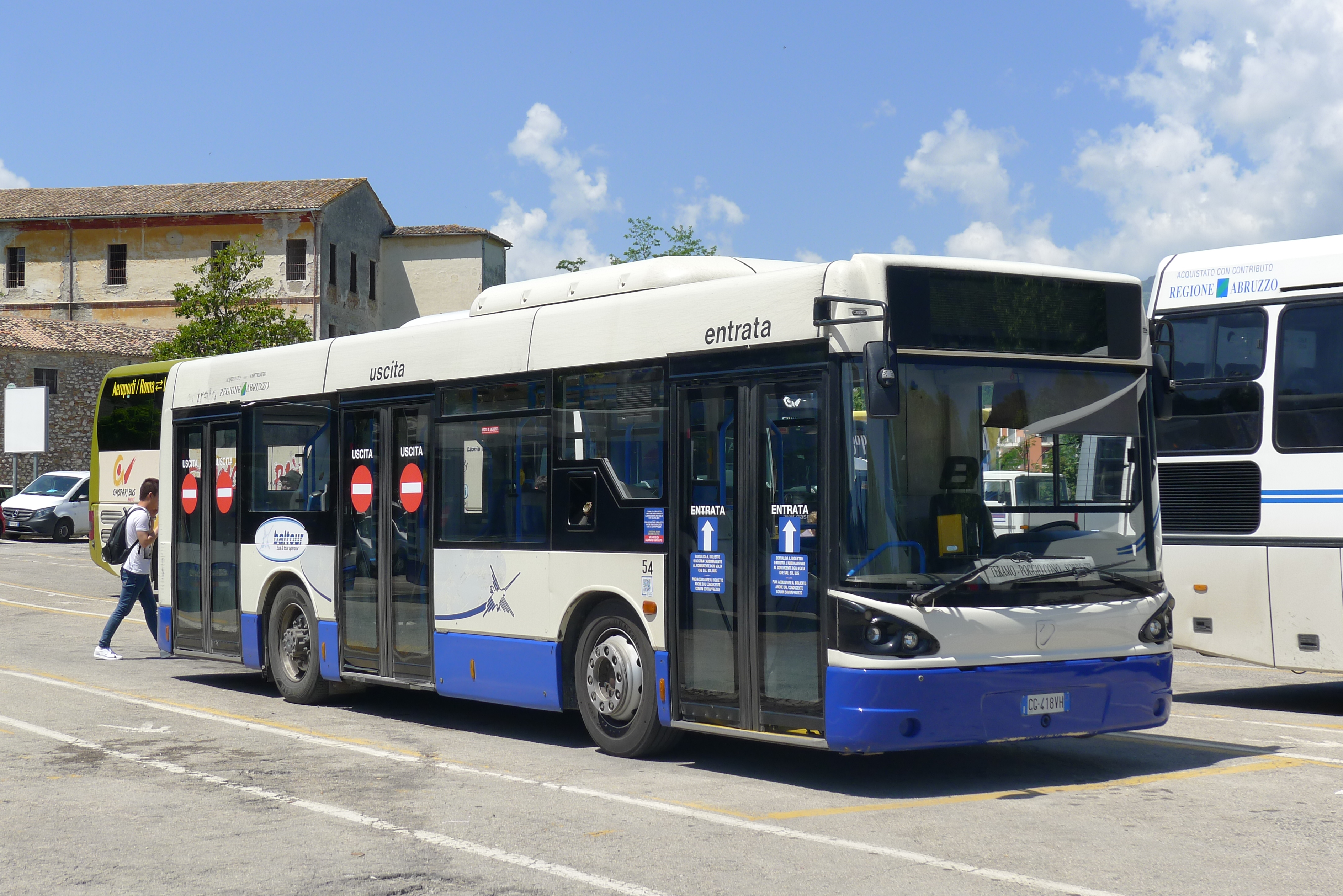 CAM Tango Teramo Baltour